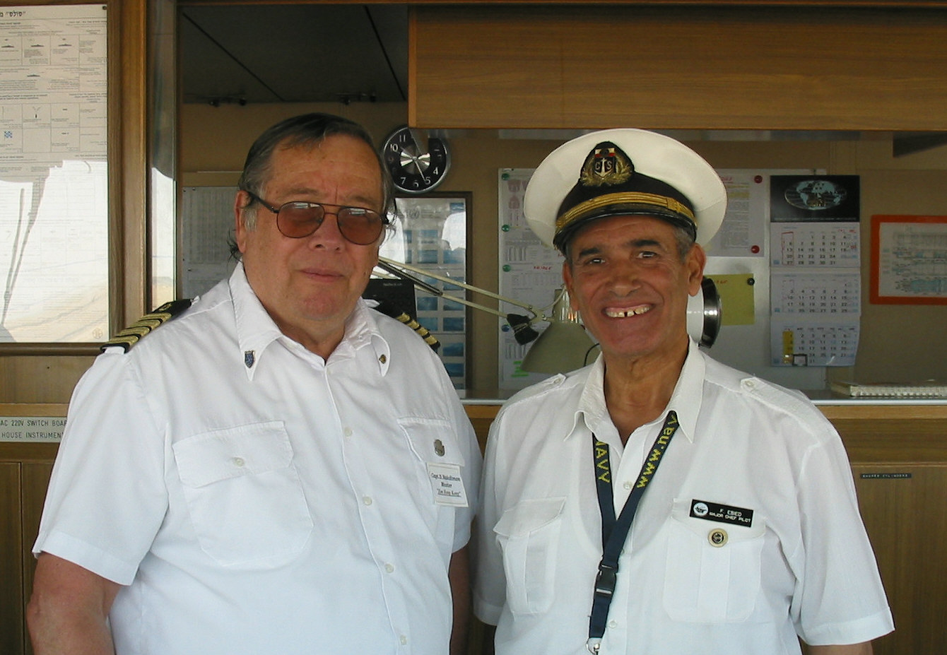 רב חובל דני נקדימון מצי הסוחר הישראלי עם רב חובל פ עבד מרשות תעלת סואץ שמספר כי הטיל את המוקשים במיצרי יובל במלחמת יום הכיפורים.